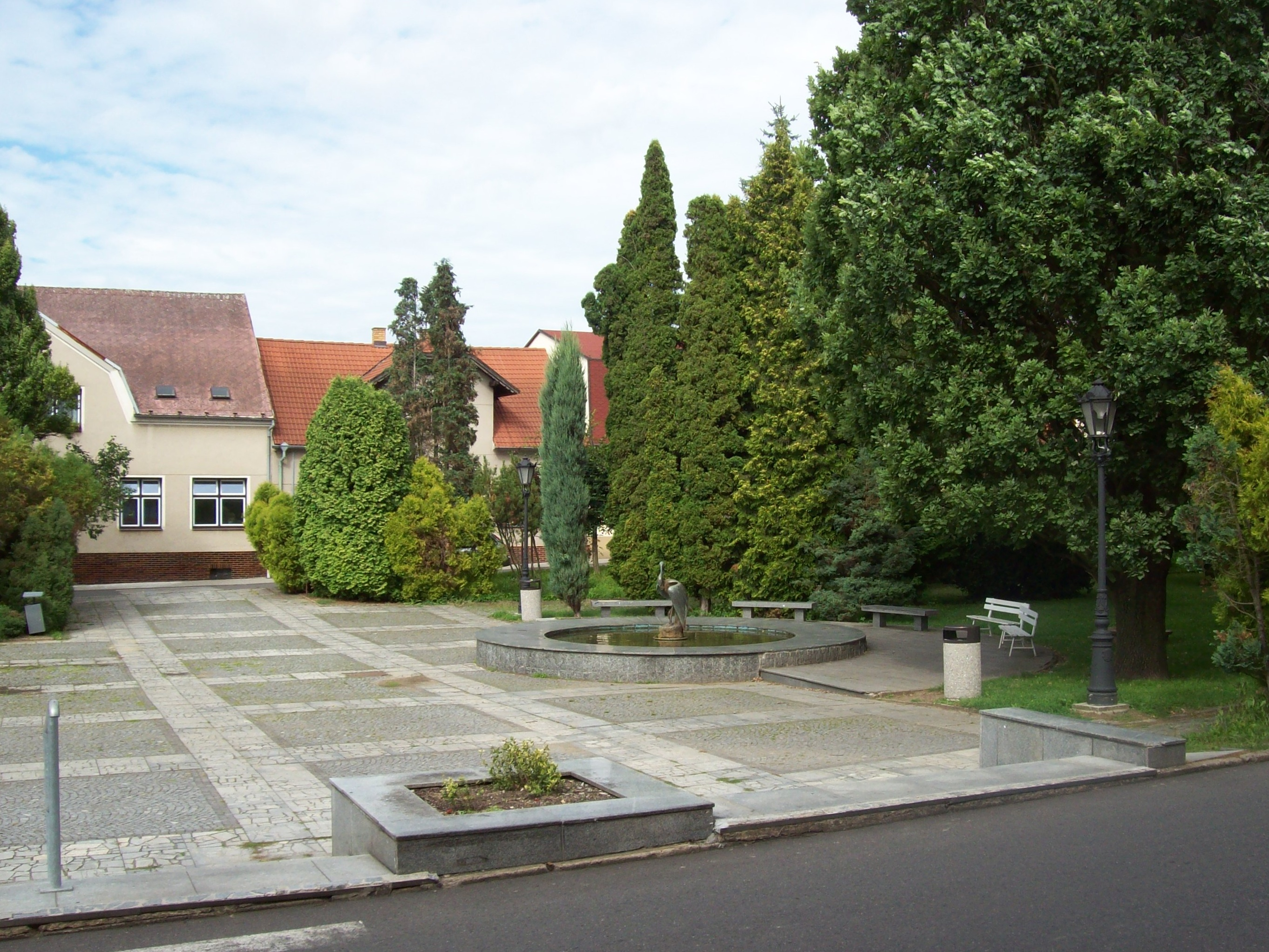 Komárov (Be) - park na náměstí Míru